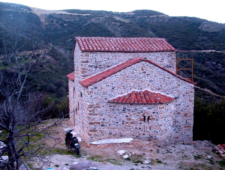 Άγιος Δημήτριος Καταρράκτη